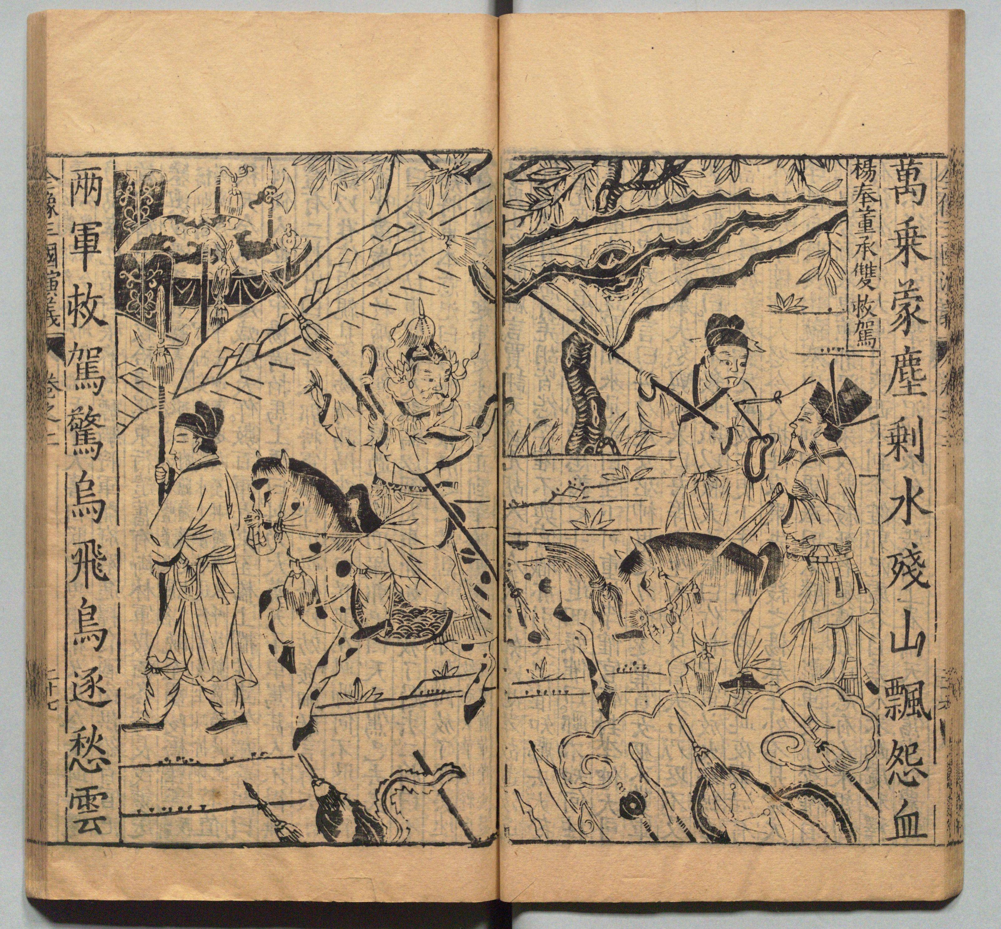 《新刊校正古本大字音释三国志通俗演义》 明万历十九年书林周曰校刊本